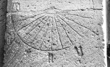 kanoniale Sonnenuhr, NON am Mittag, Elisabethkapelle Hameln